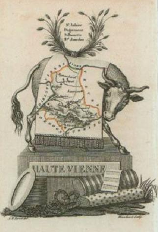 "Le département de la Haute-Vienne" gravure de A.M. Perrot et Blanchard